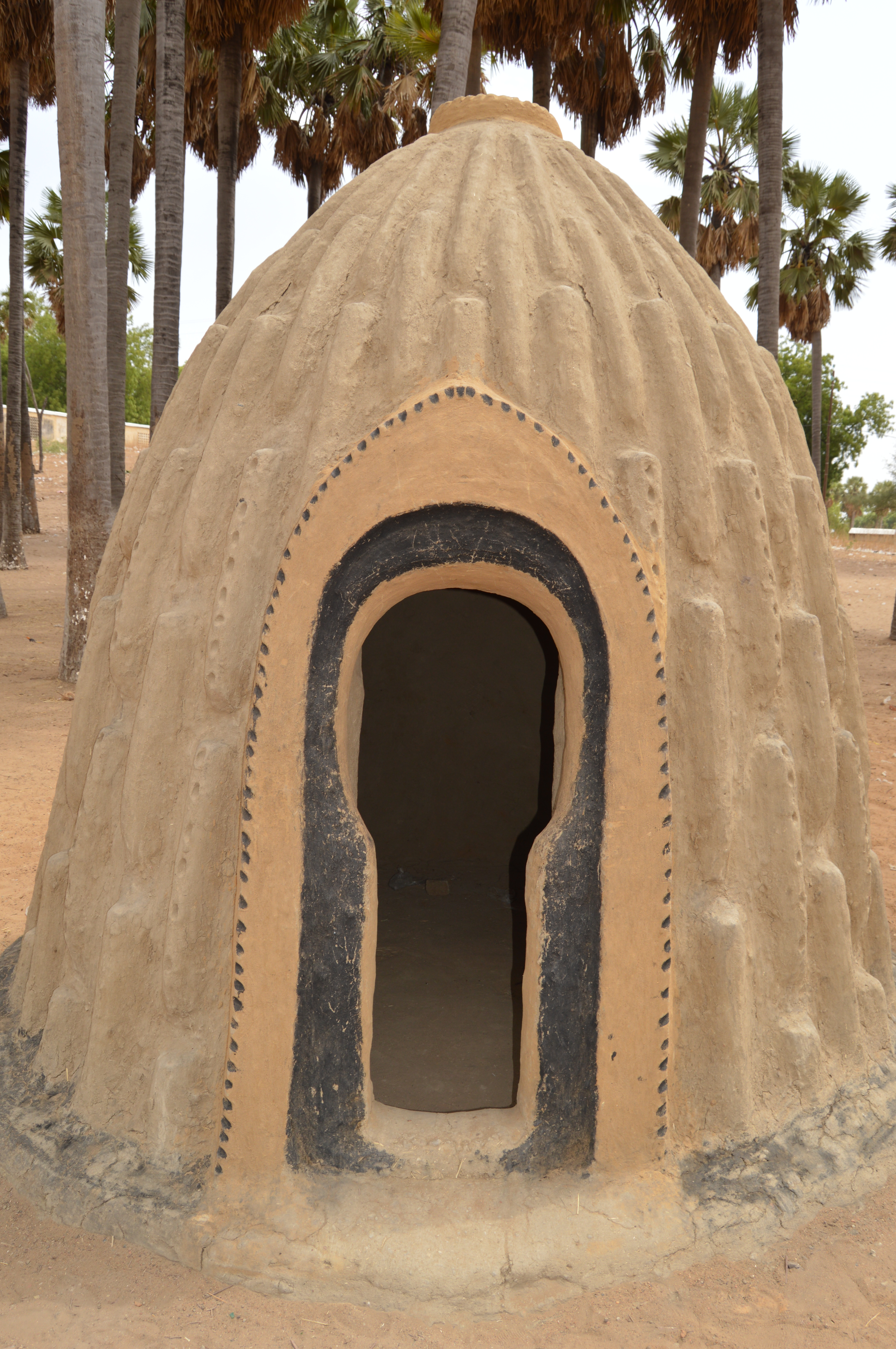 Case obus conçu lors du Tokna Massana